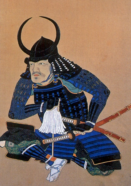 母里友信。安土桃山時代から江戸時代にかけての武将。別名「母里太兵衛」としても知られている。